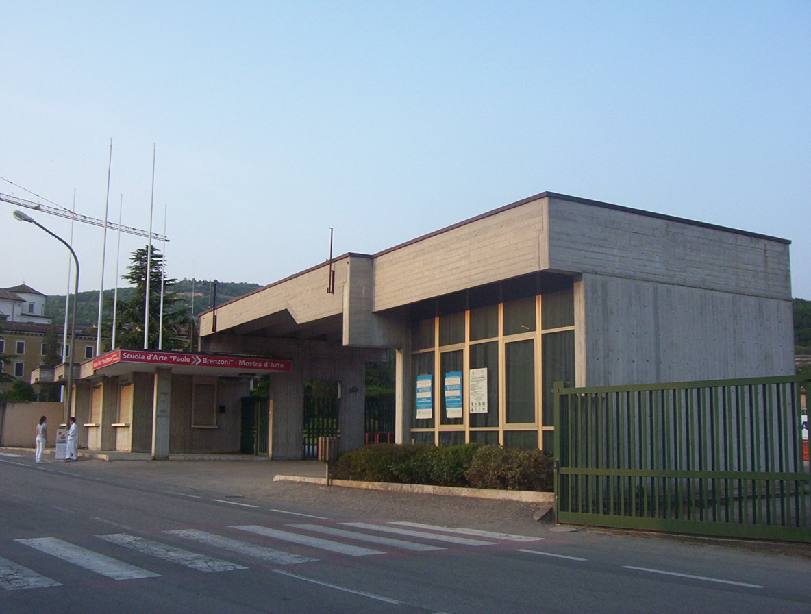 Entrate della Fiera di Sant'Ambrogio di Valpolicella e della scuola del marmo